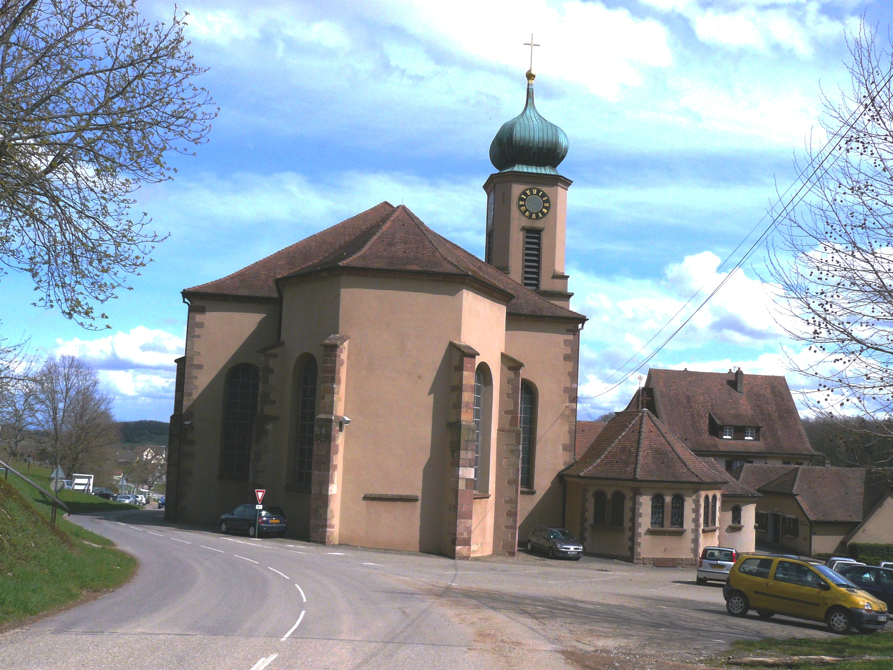 La basilique de Notre Dame de Thierenbach (vue arrière) au Prieuré de Thierenbach (Haut-Rhin).